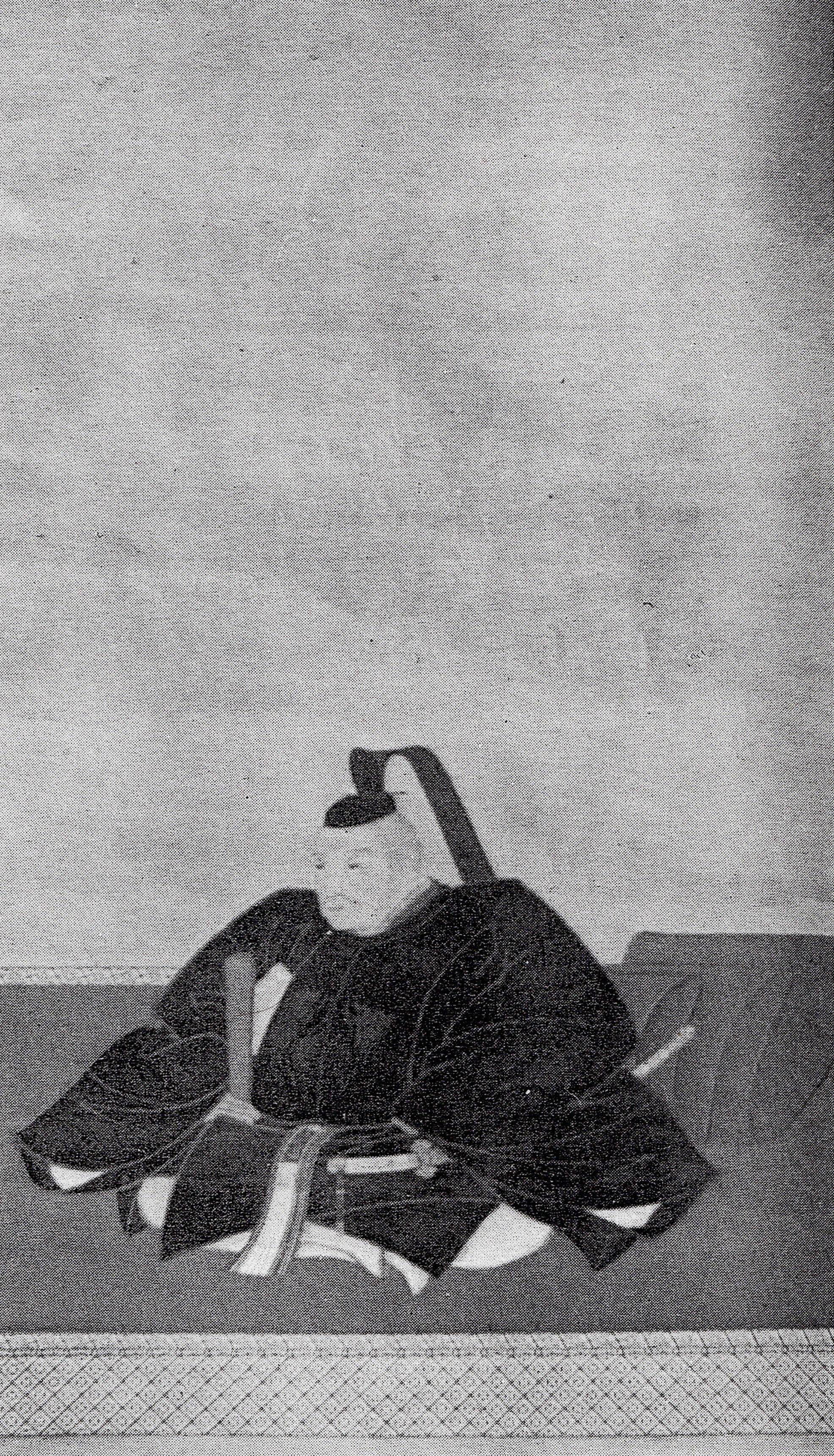 小笠原忠固の肖像(モノクロ)。